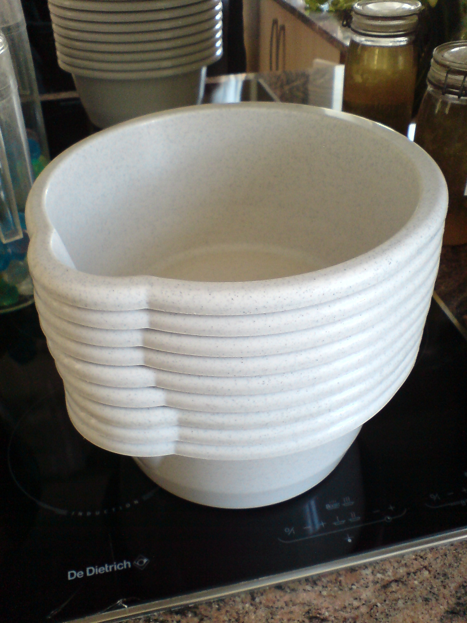 Il s'agit d'une pile de cuvettes destinées à la cuisine.